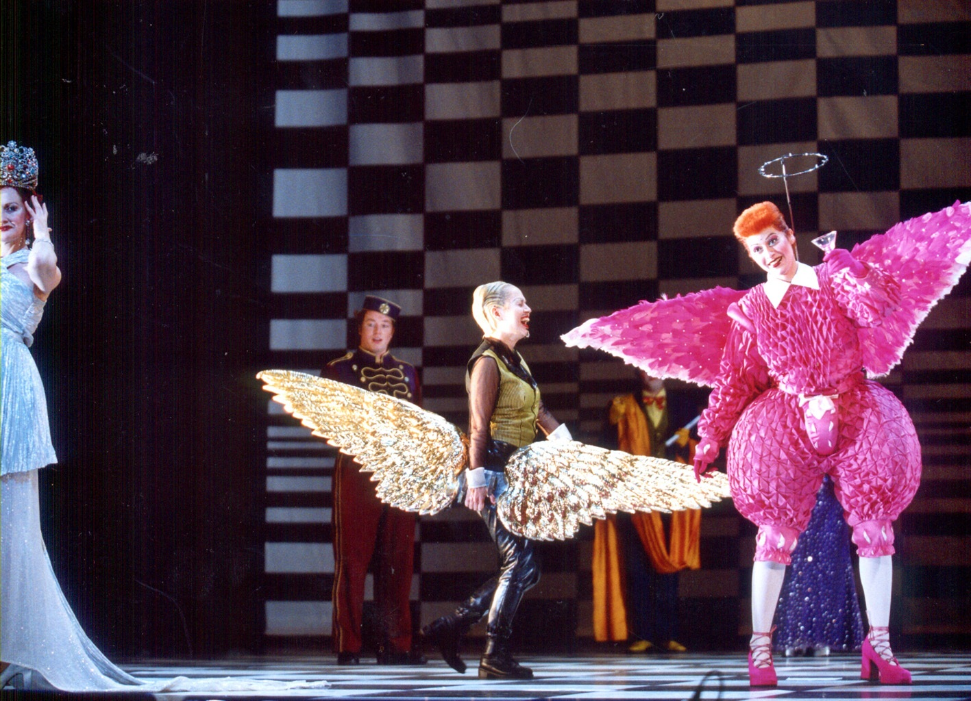 הכתרתה של פופיאה 1997